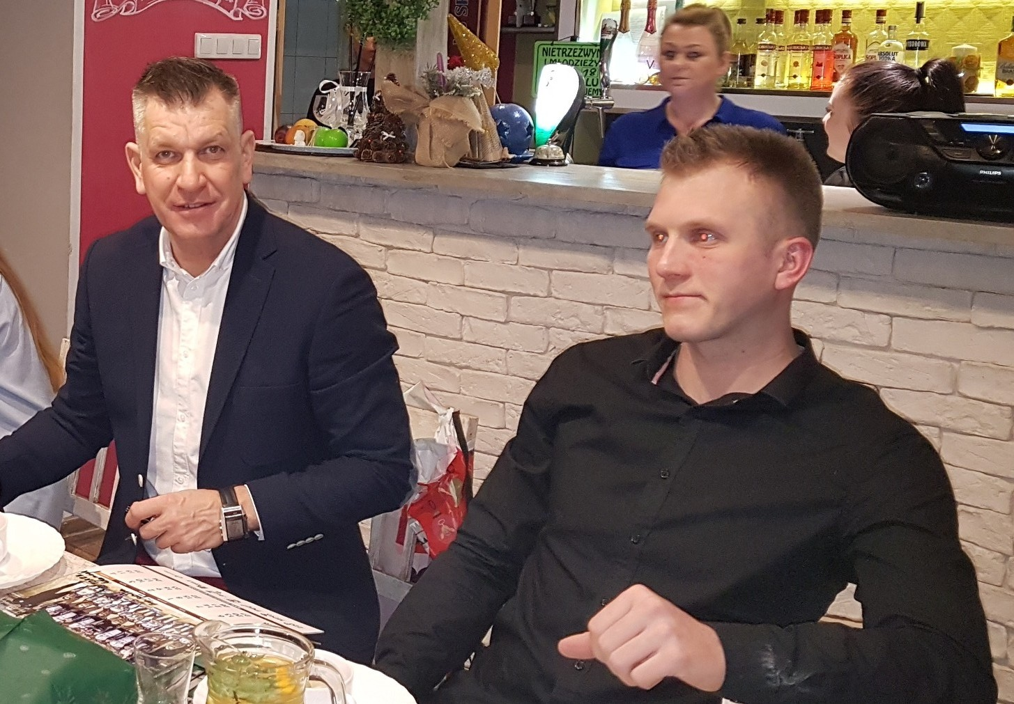 Aleksander Król (L), Tomasz Adamczyk - trenerzy II ligi Spójni siatkówki kobiet